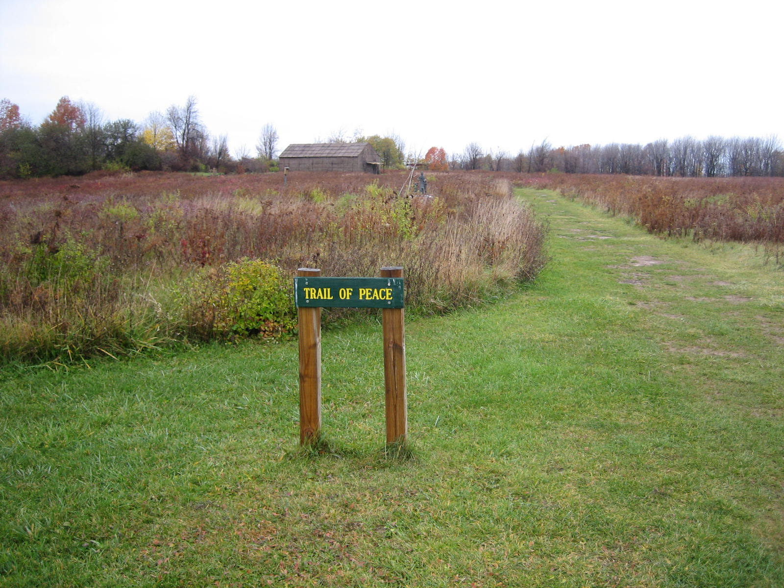 Ganondangan, Victor, NY